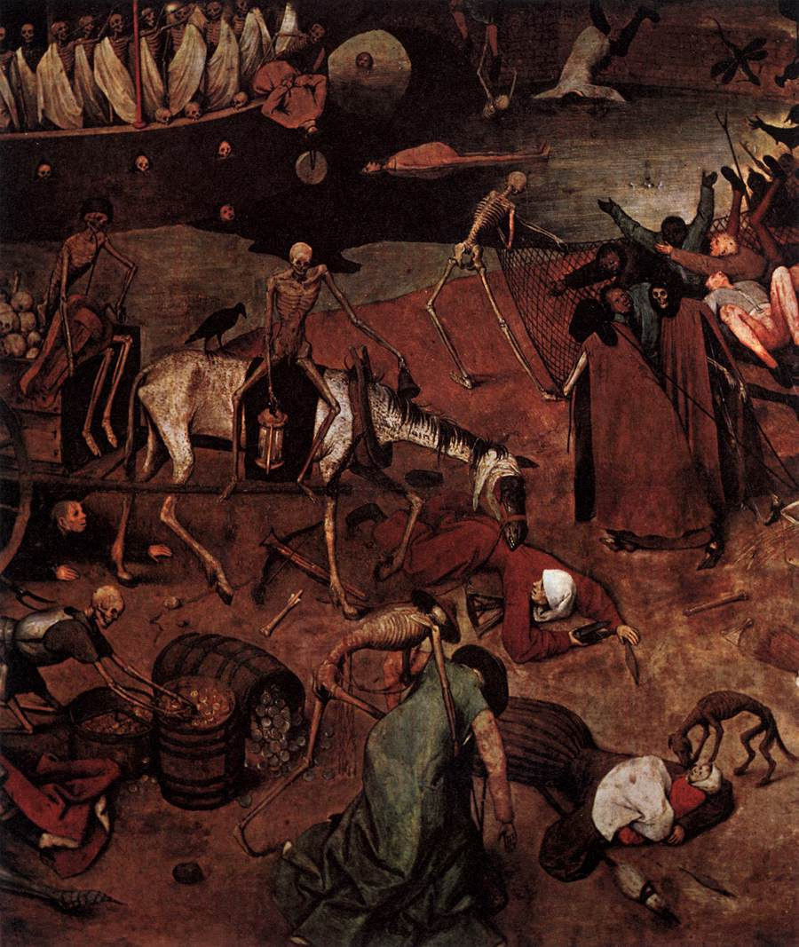 detail